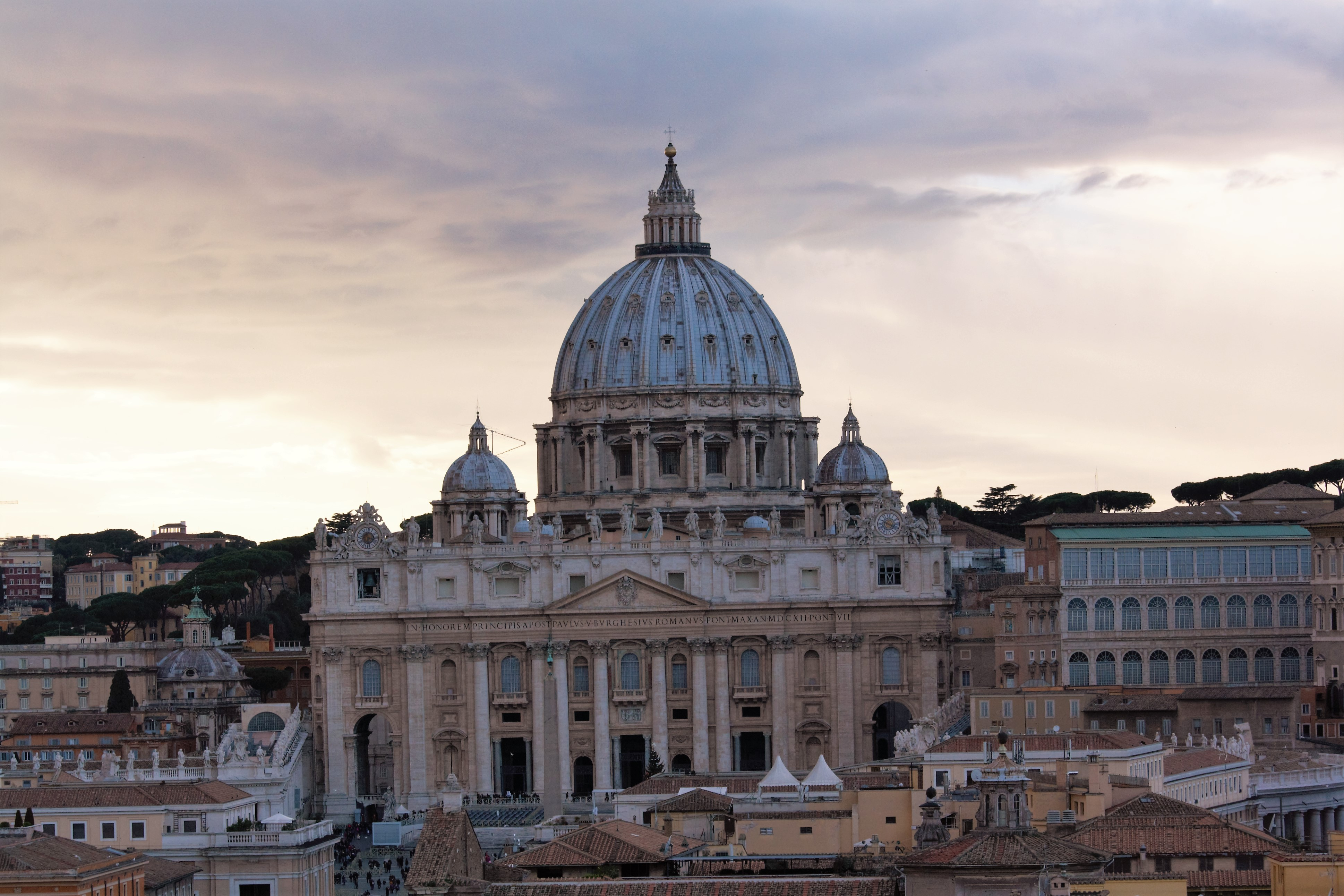 san pietro e il suo cuppolone